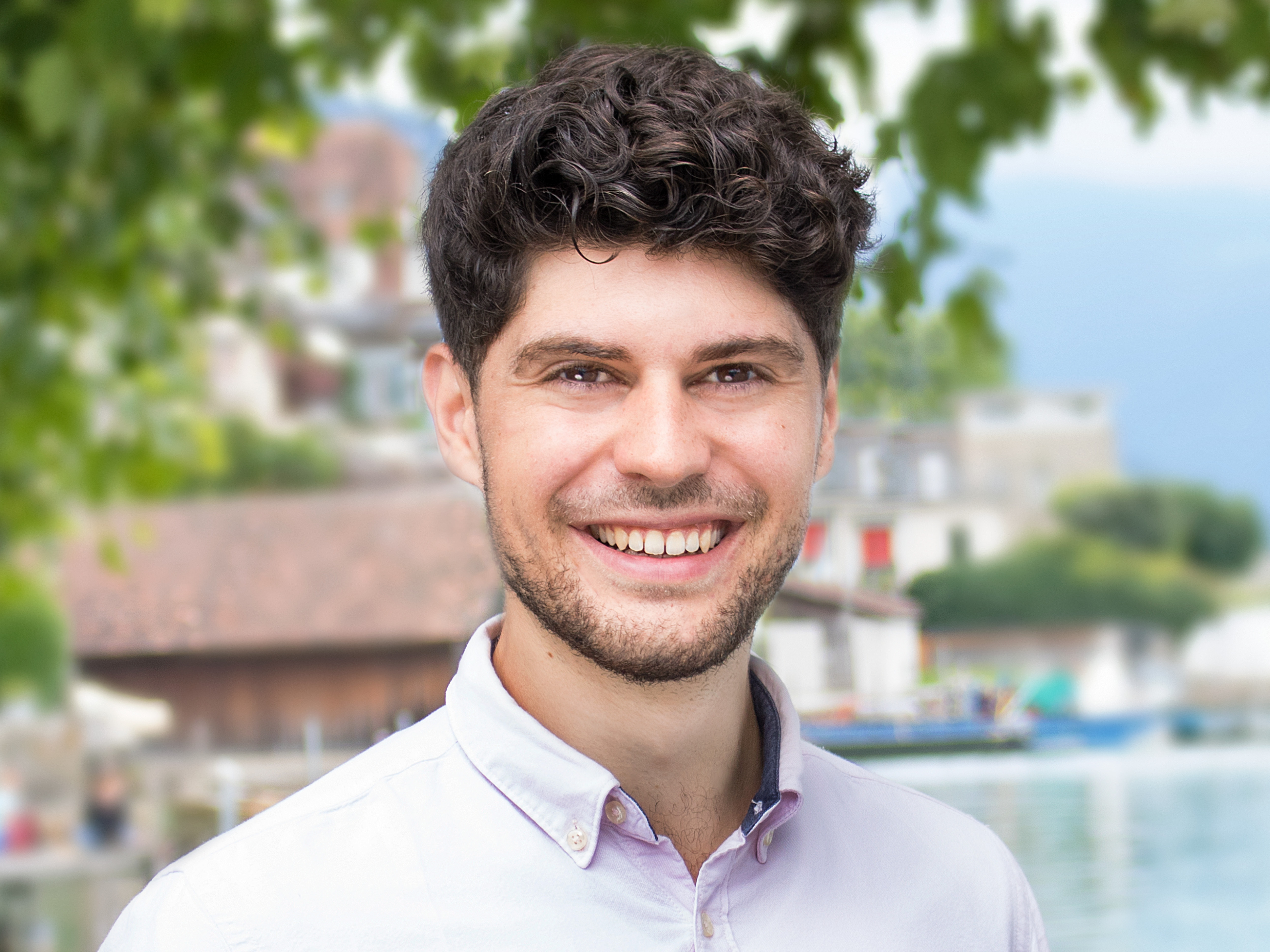 Kantonsrat Luzian Franzini